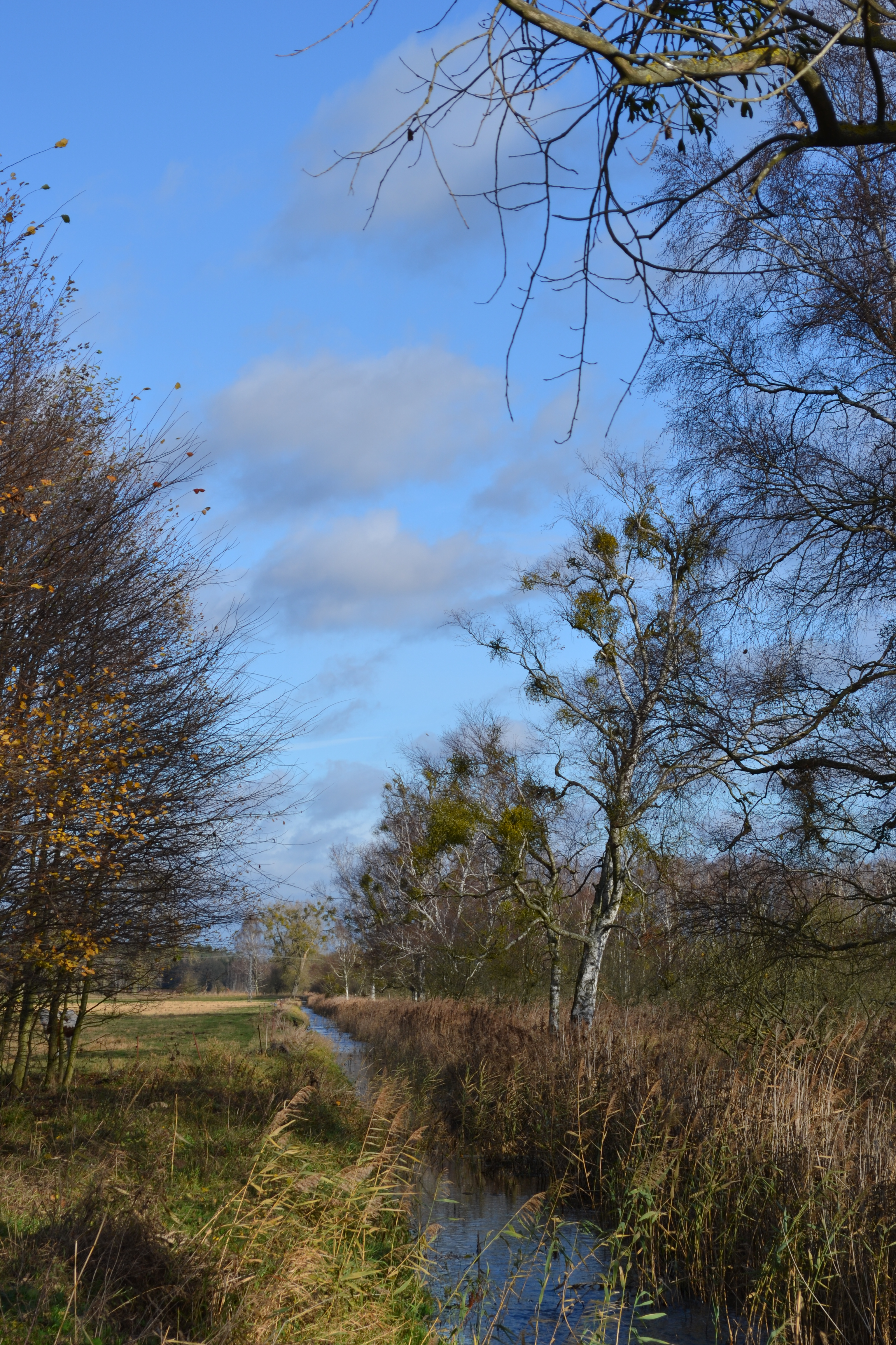 Die Randow bei Borken (Gemeinde Viereck, Mecklenburg-Vorpommern); Bereich im EU-Vogelschutzgebiet DE-2350-401 Ueckermünder Heide